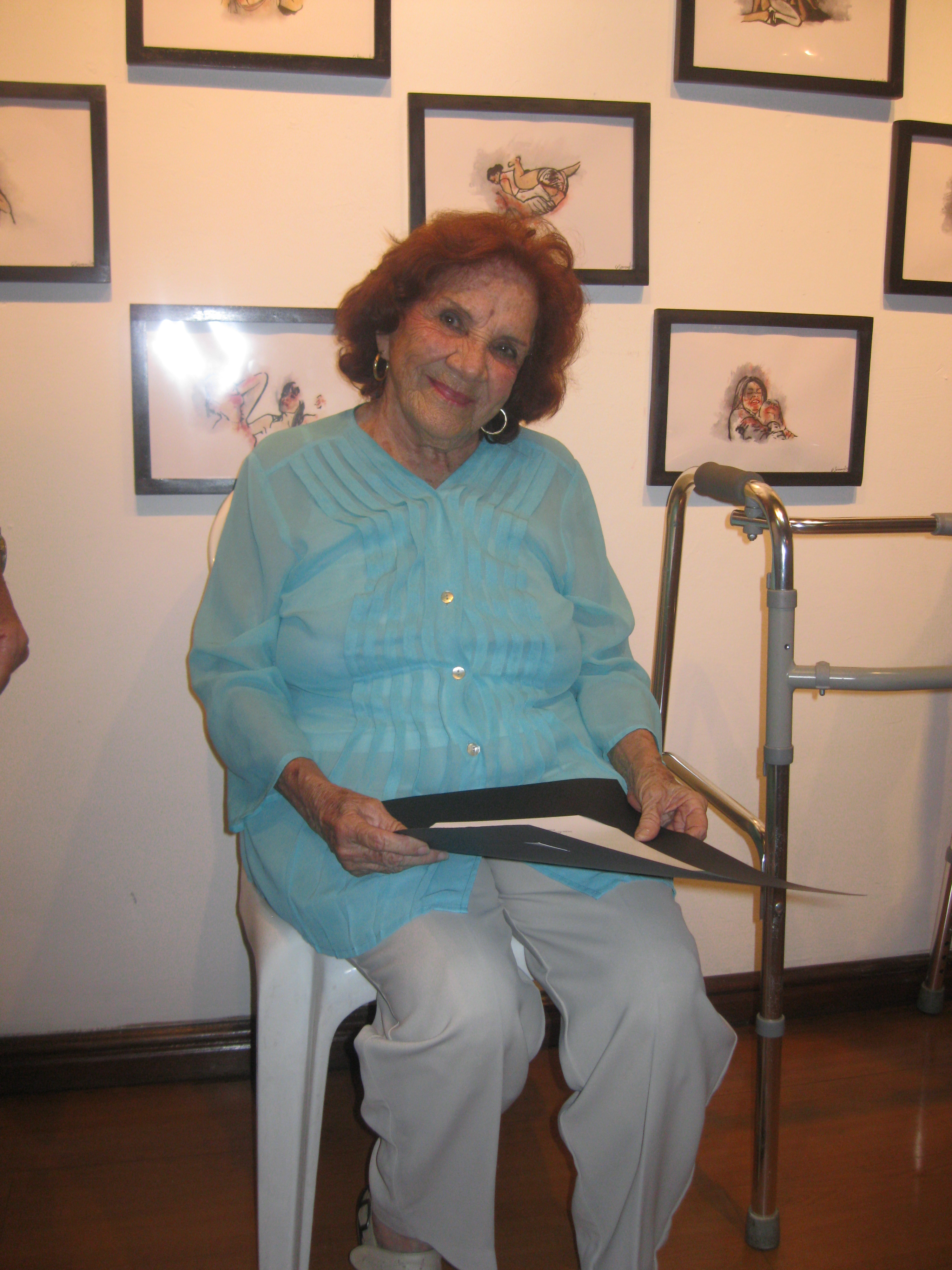 Yela Loffredo en la exposición Miradas femeninas / feministas en la Casa de la Cultura Núcleo del Guayas, de la cual fue parte, el 5 de marzo de 2013.